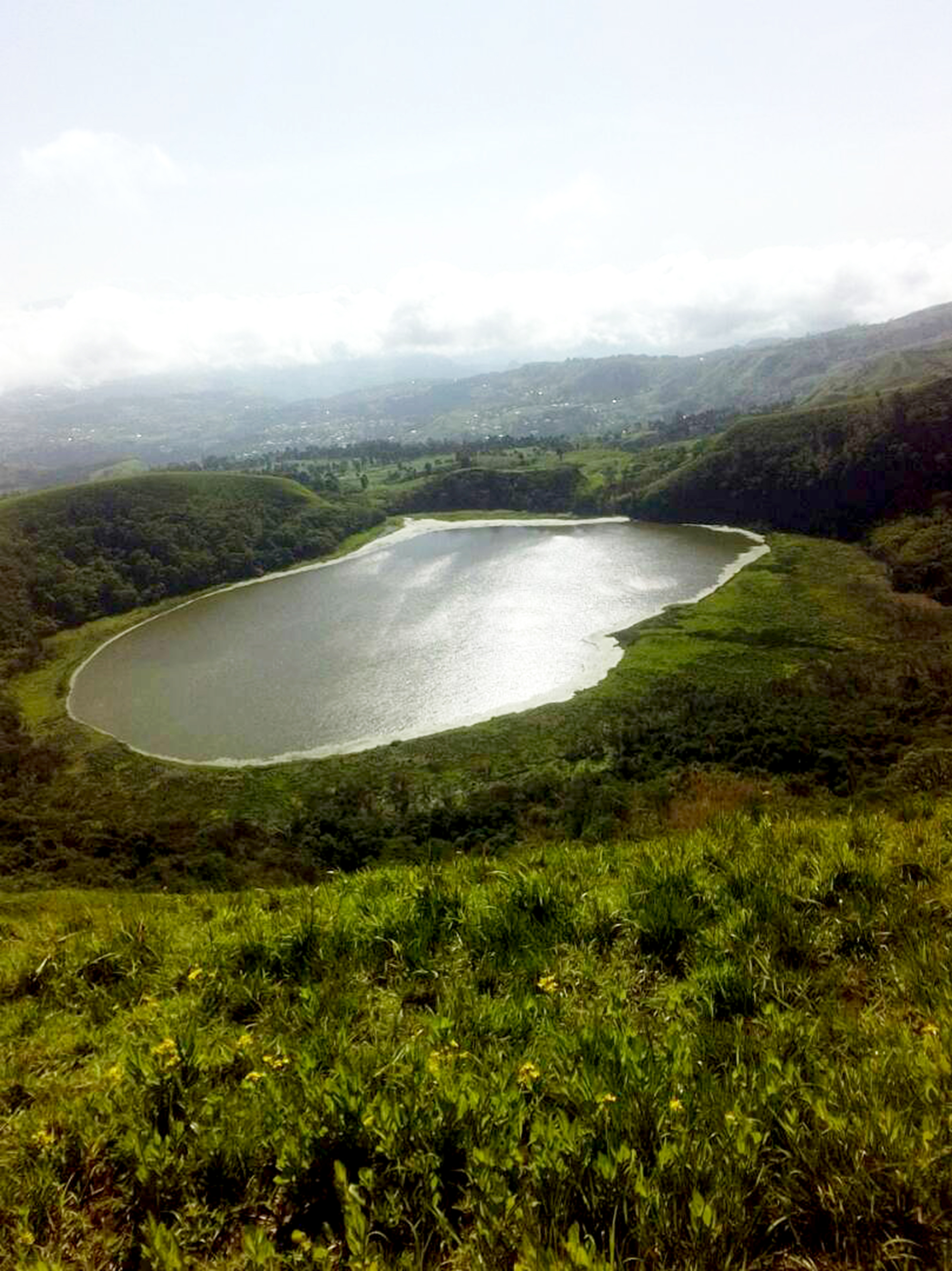 View of Lake Bambili